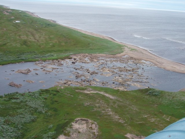 Устье р. Пялица